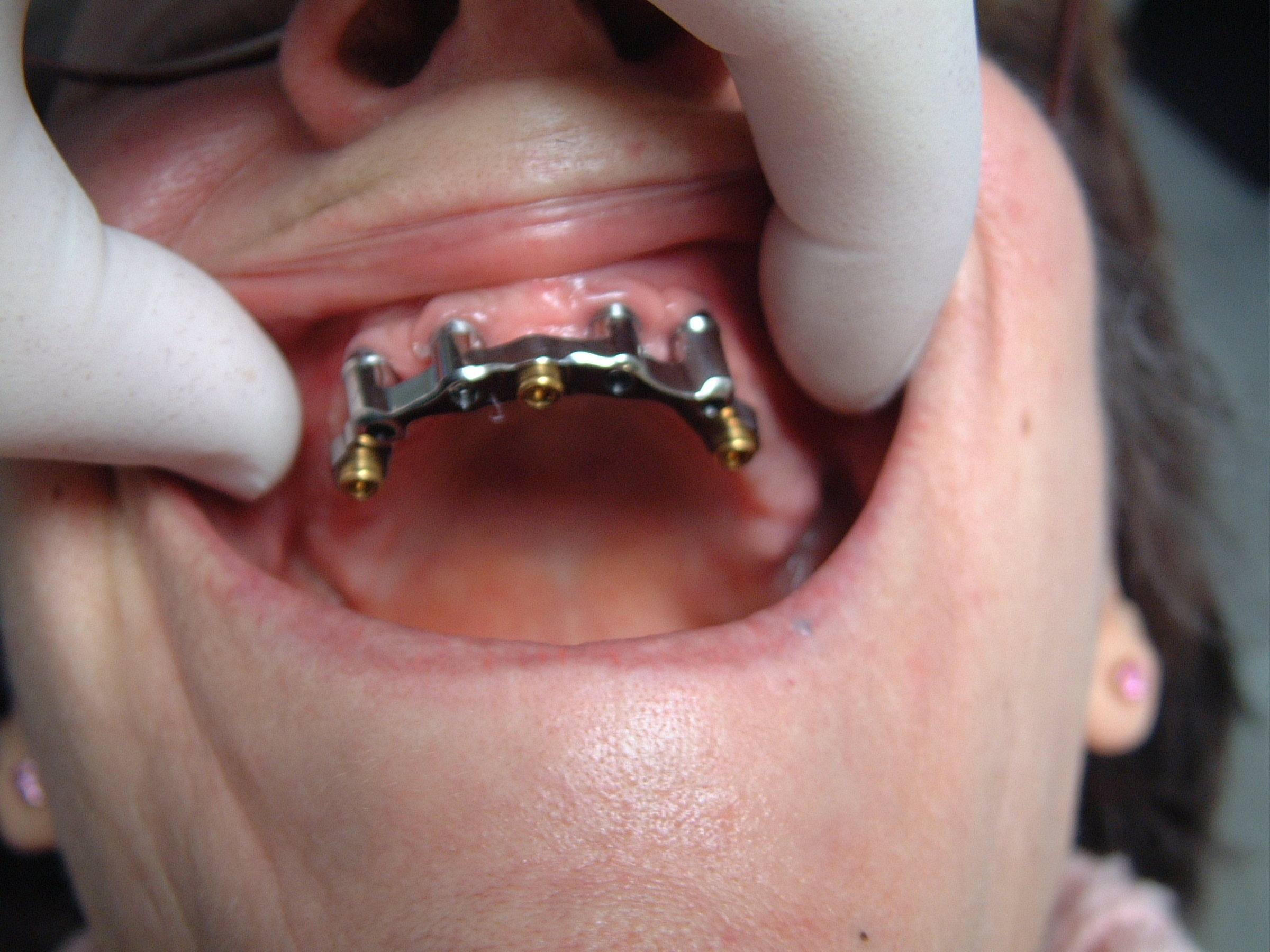 système de barre de fixation comportant 3 "Locators" et portée par 4 implants